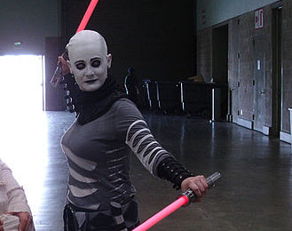 Asajj Ventress cropped